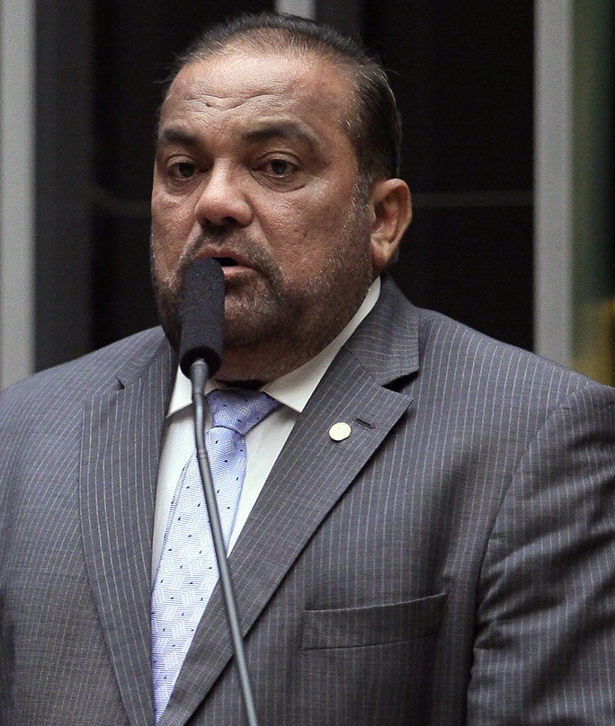 Hélio Leite em outubro de 2016